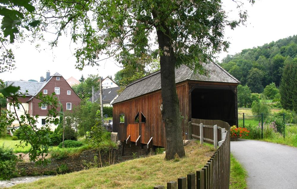 Hammerbrücke in Untersachsenfeld